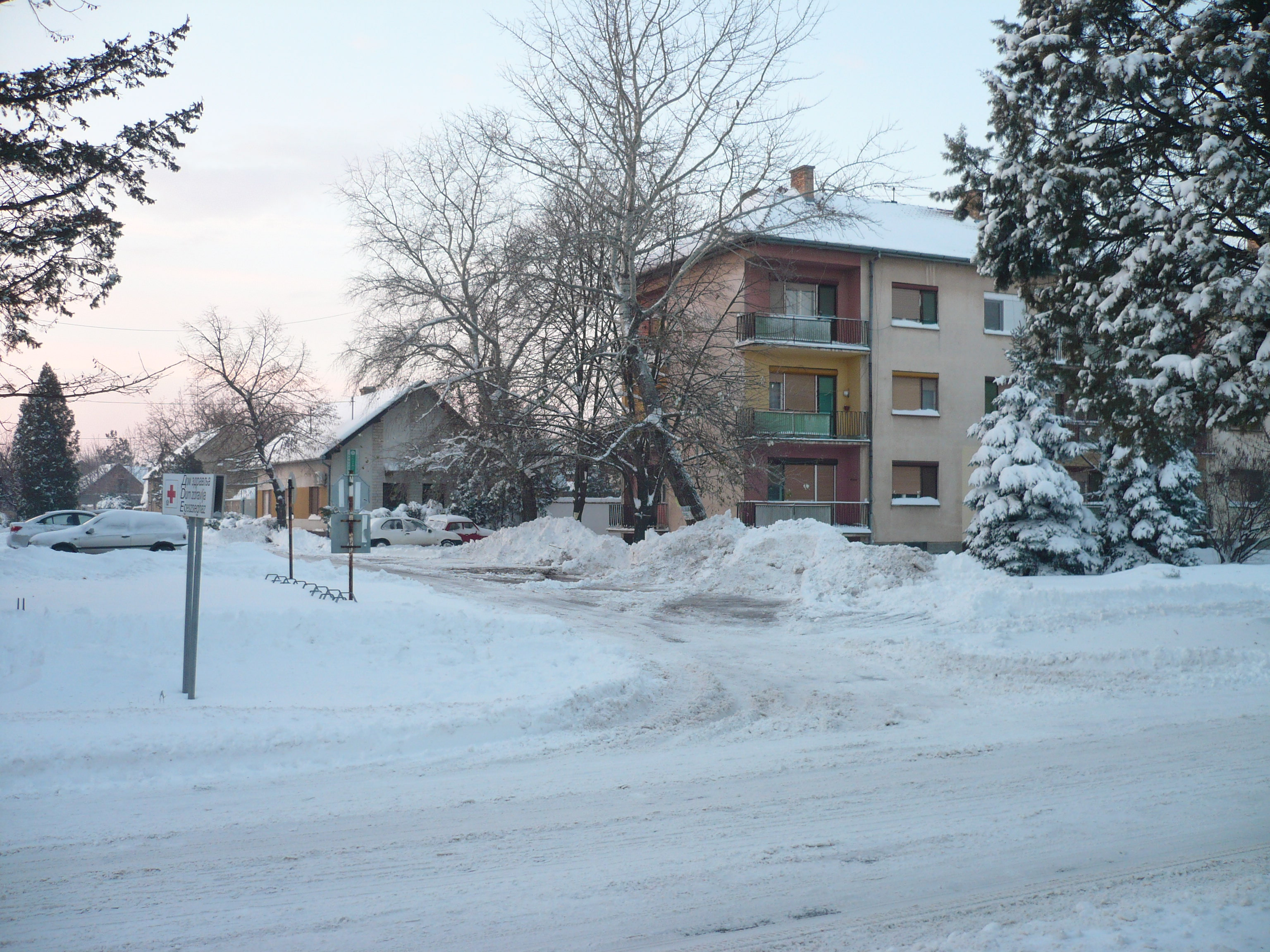 Ada központja 2012 telén (Szerbia)